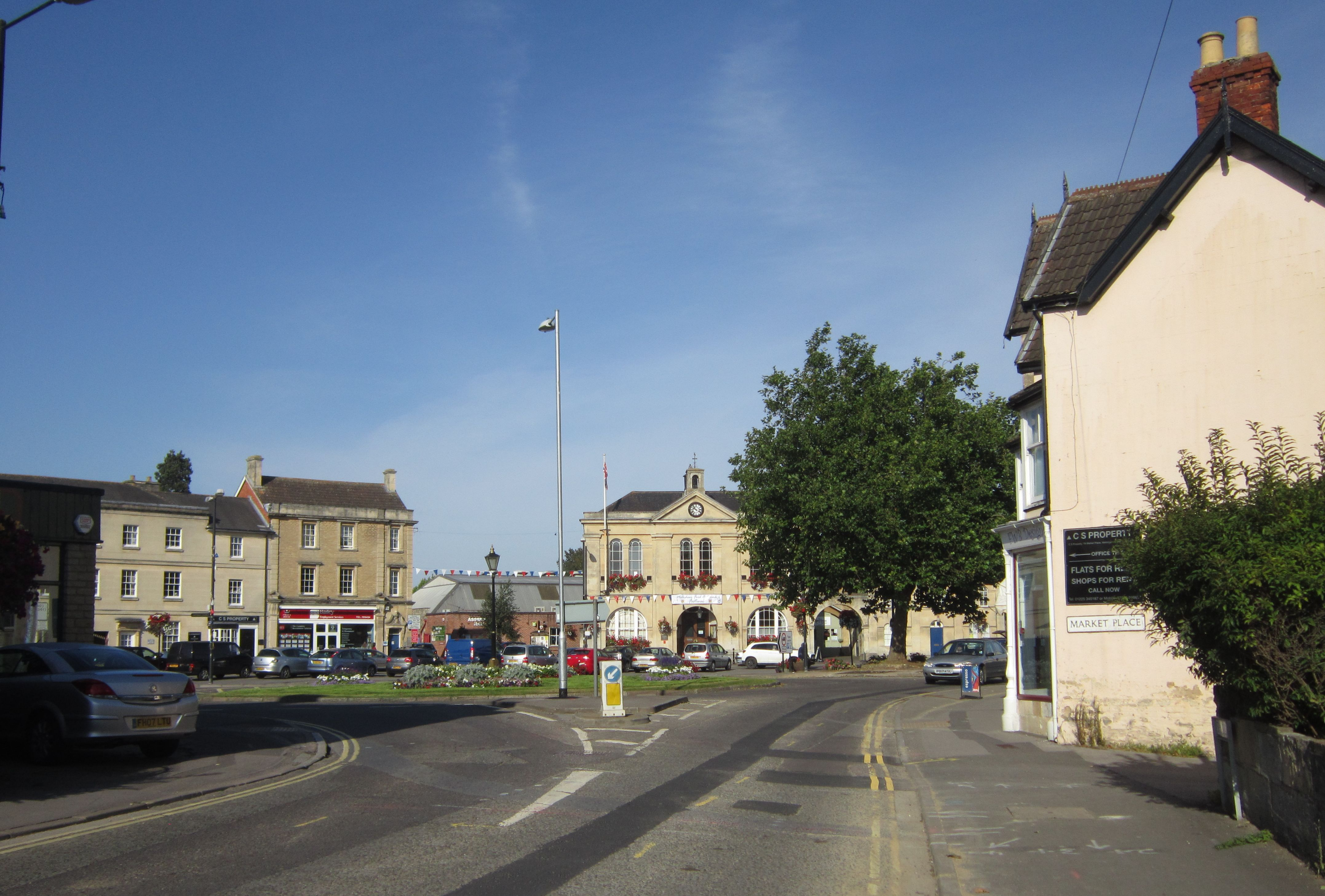 Melksham